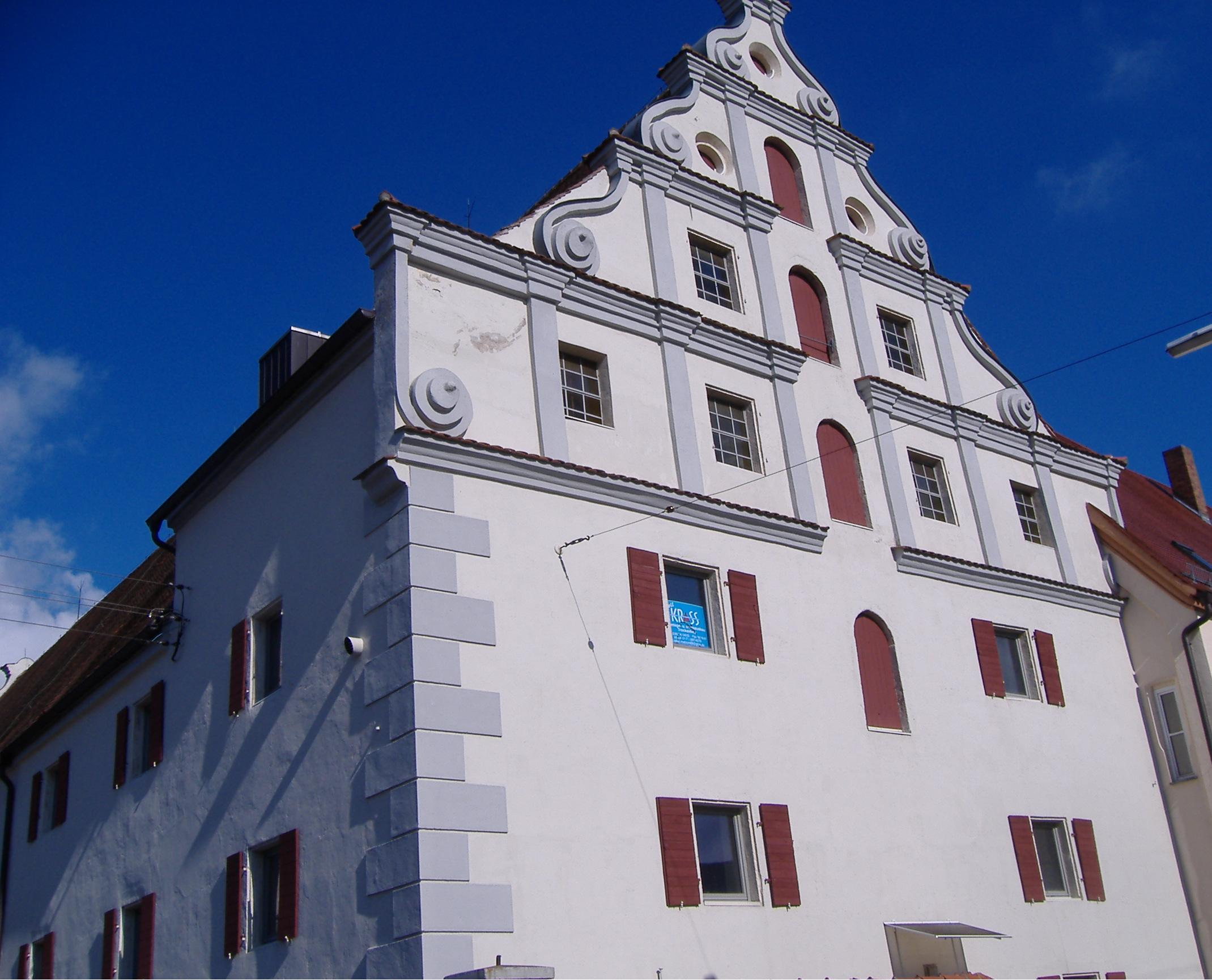 Höchstädt